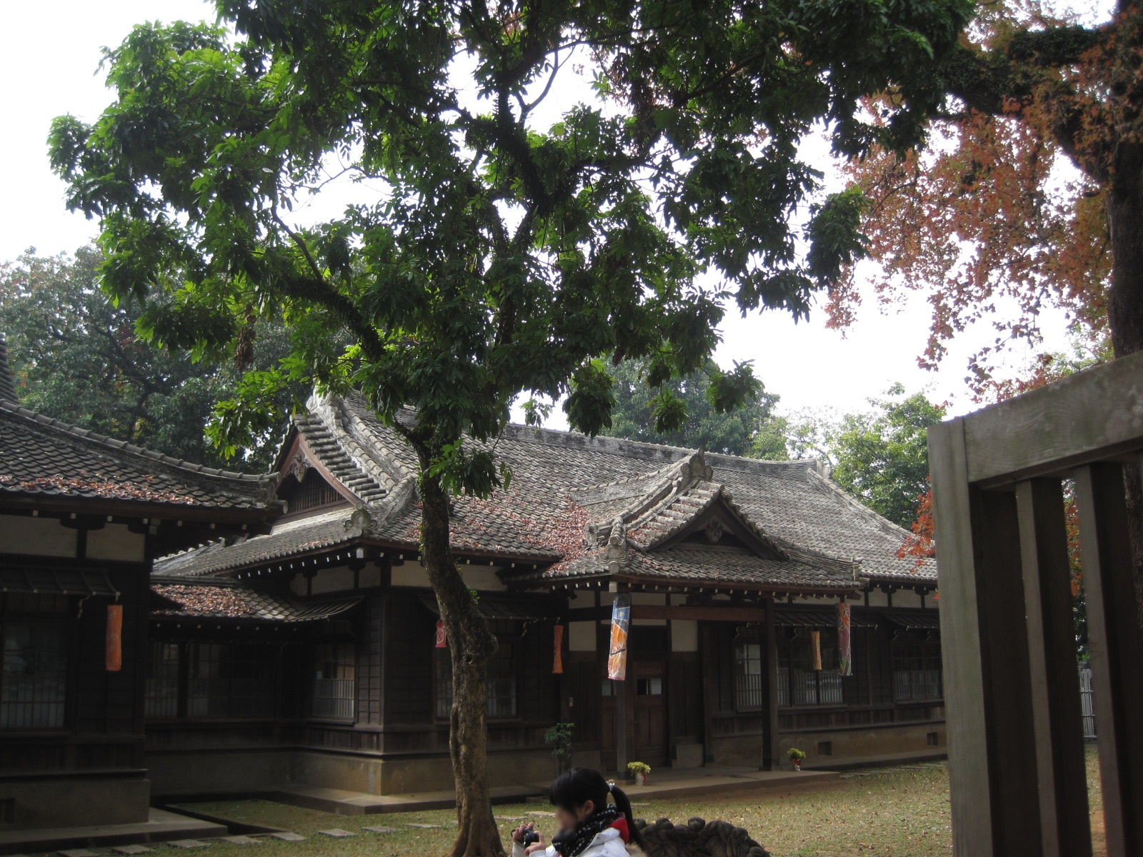 中文（台灣）: 嘉義神社社務所。